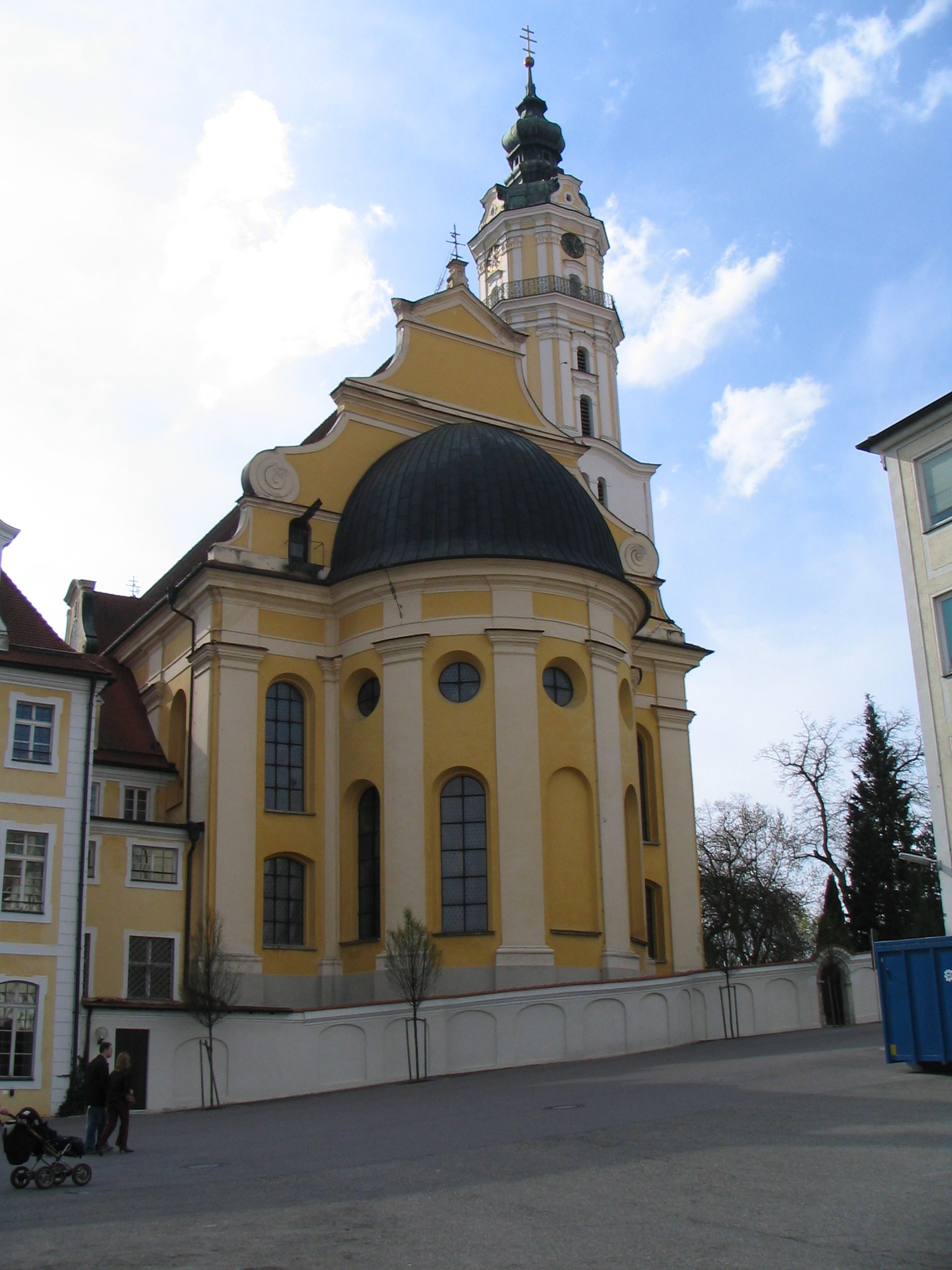 Wallfahrtskirche Heilig Kreuz Donauwörth, Germany - Aussenansicht